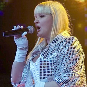 Маргарита Суханкина на фестивале "Легенды Ретро FM 2009"